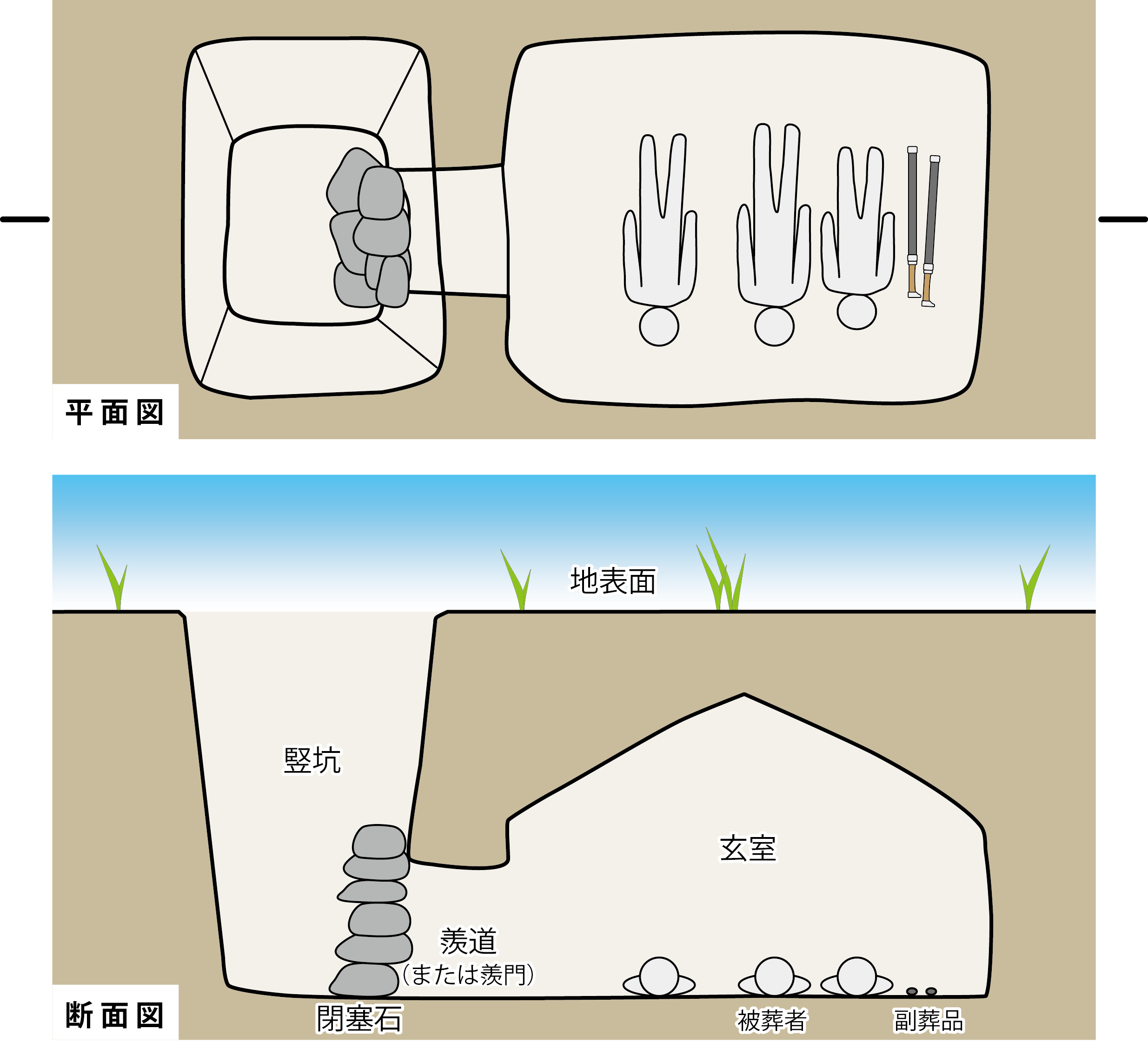 古墳時代中期に九州地方南部に分布した「地下式横穴墓」の構造模式図